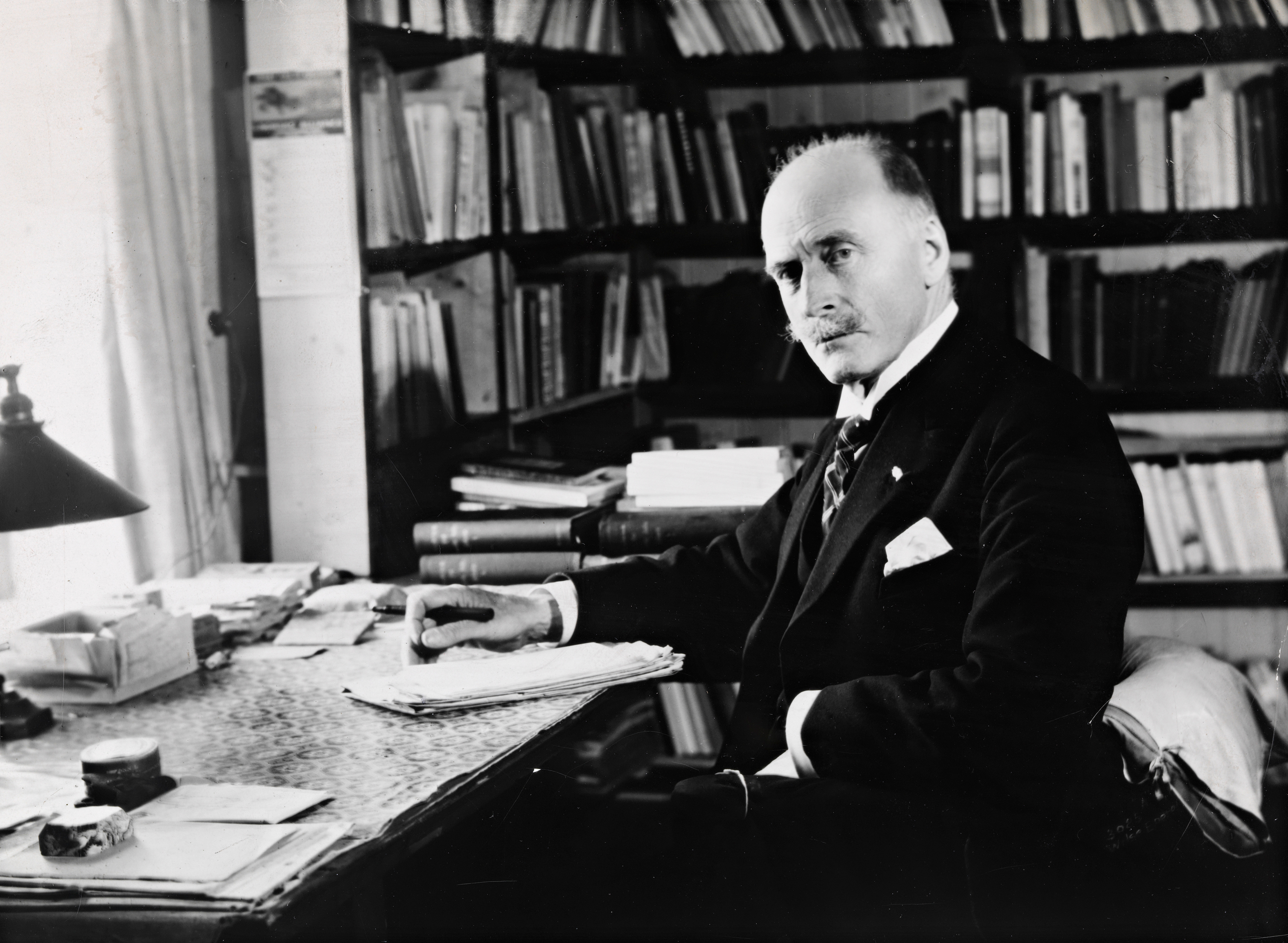 Knut Hamsun i dikterstua på Nørholm, 1929.